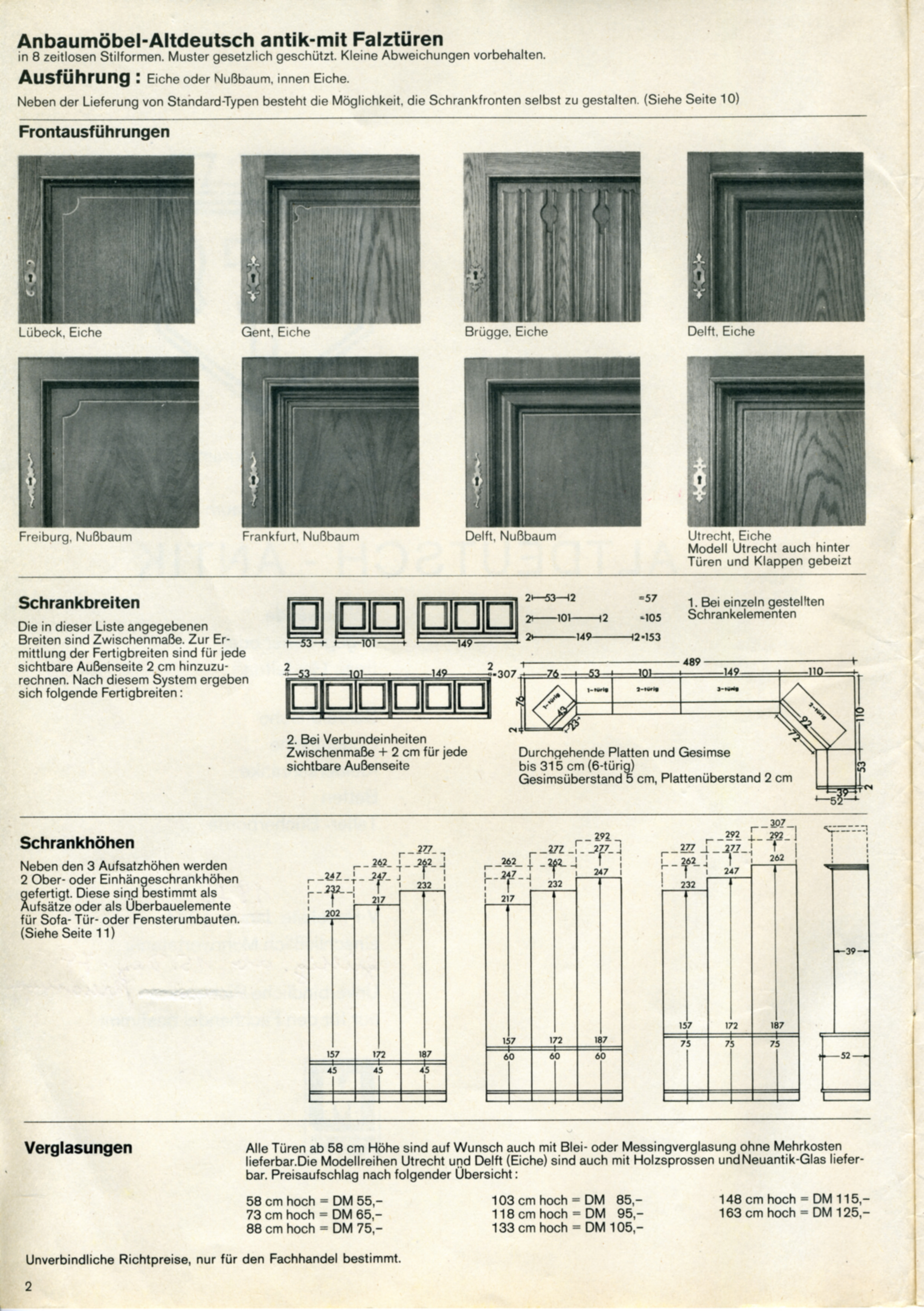 Typenplan mit V-Preisen für Schrankwandsystem, Altdeutsch in acht Varianten, Möbelfabrik Bernard Frechen GmbH & Co KG, Steinheim/Westfalen